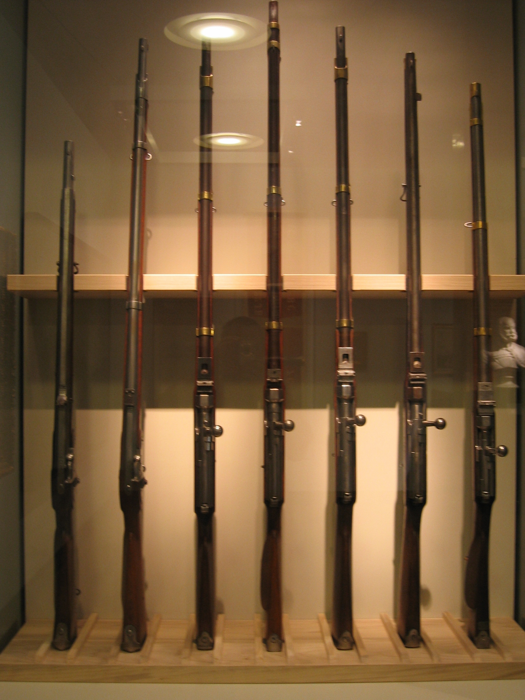 Das Dryse Zündnadelgewehr